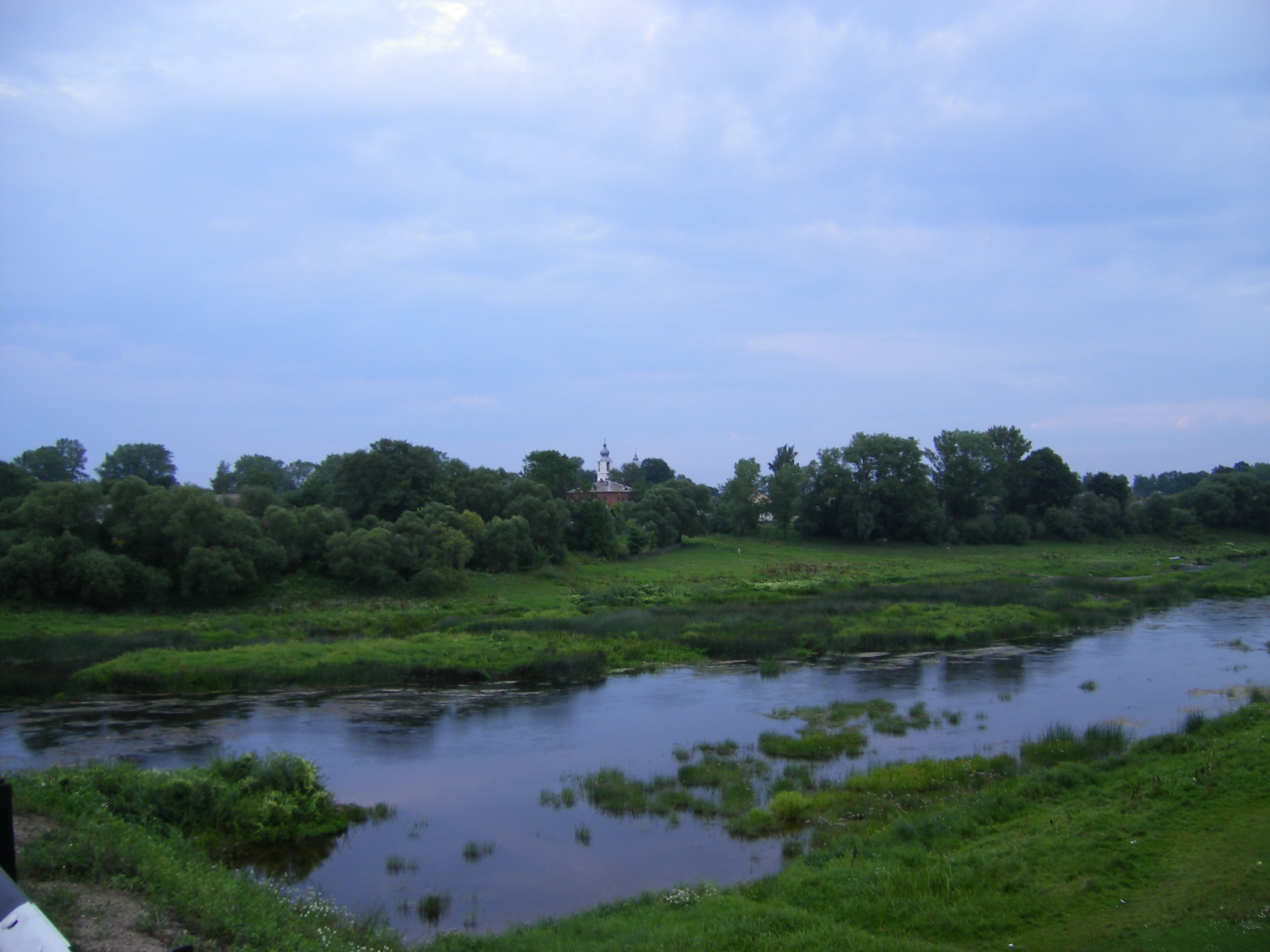 Dzisna river in Dzisna, Belarus